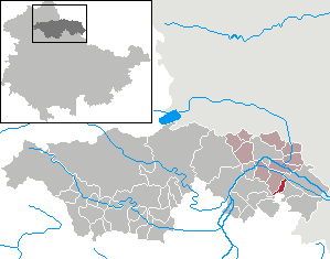 Nausitz in Thuringia - Kyffhäuserkreis